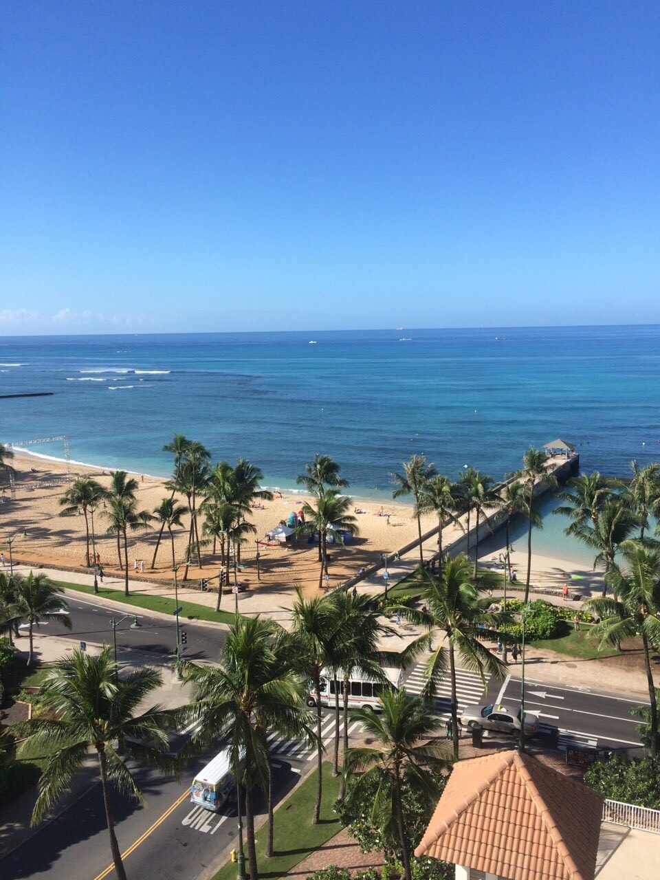 ワイキキビーチ(2014年11月撮影)